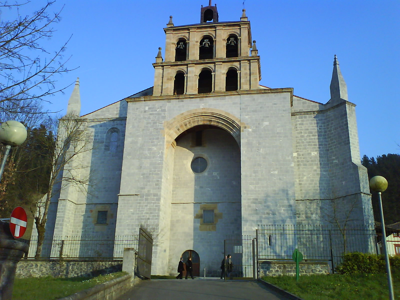 Iglesia de Santa María de la Asunción en Markina, Vizcaya, País Vaco, España.